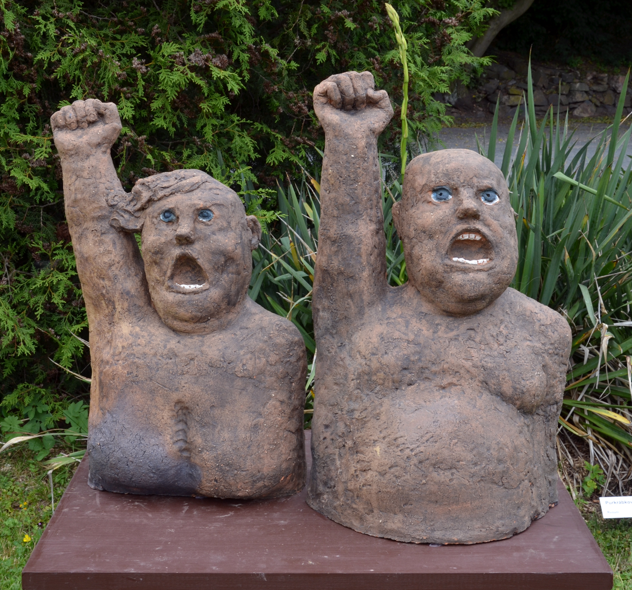 Hana Purkrábková, Řvouni, Letní keramická plastika 2014